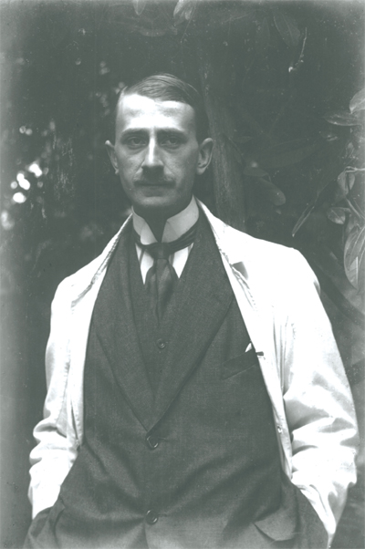 Corrado Tumiati